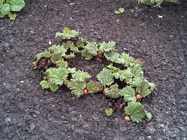 Rabarber. Serie foto's van een rabarberplant van 25 maart 2005 tot en met 13 mei 2005, één foto per week. Bestandsnamen: Rabarber-serie-1.jpg tot Rabarber-serie-8.jpg. Foto zelf gemaakt. Public Domain.